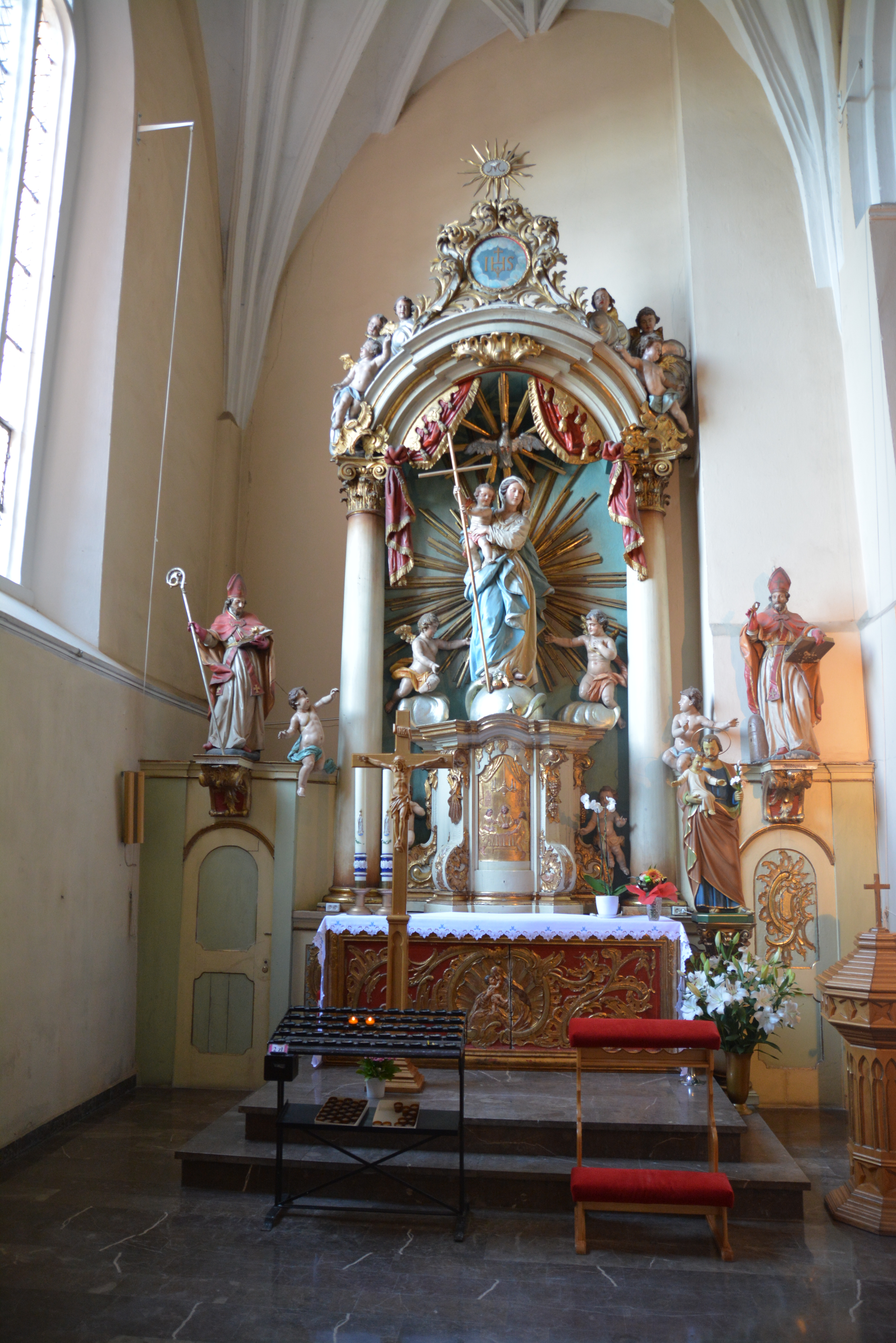 Kościół p.w. św. Michała Archanioła w Świebodzinie